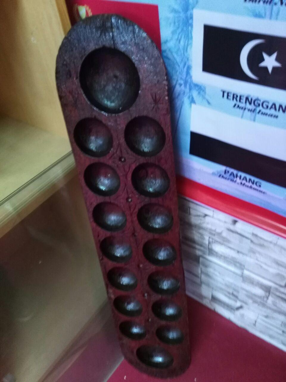 Congkak